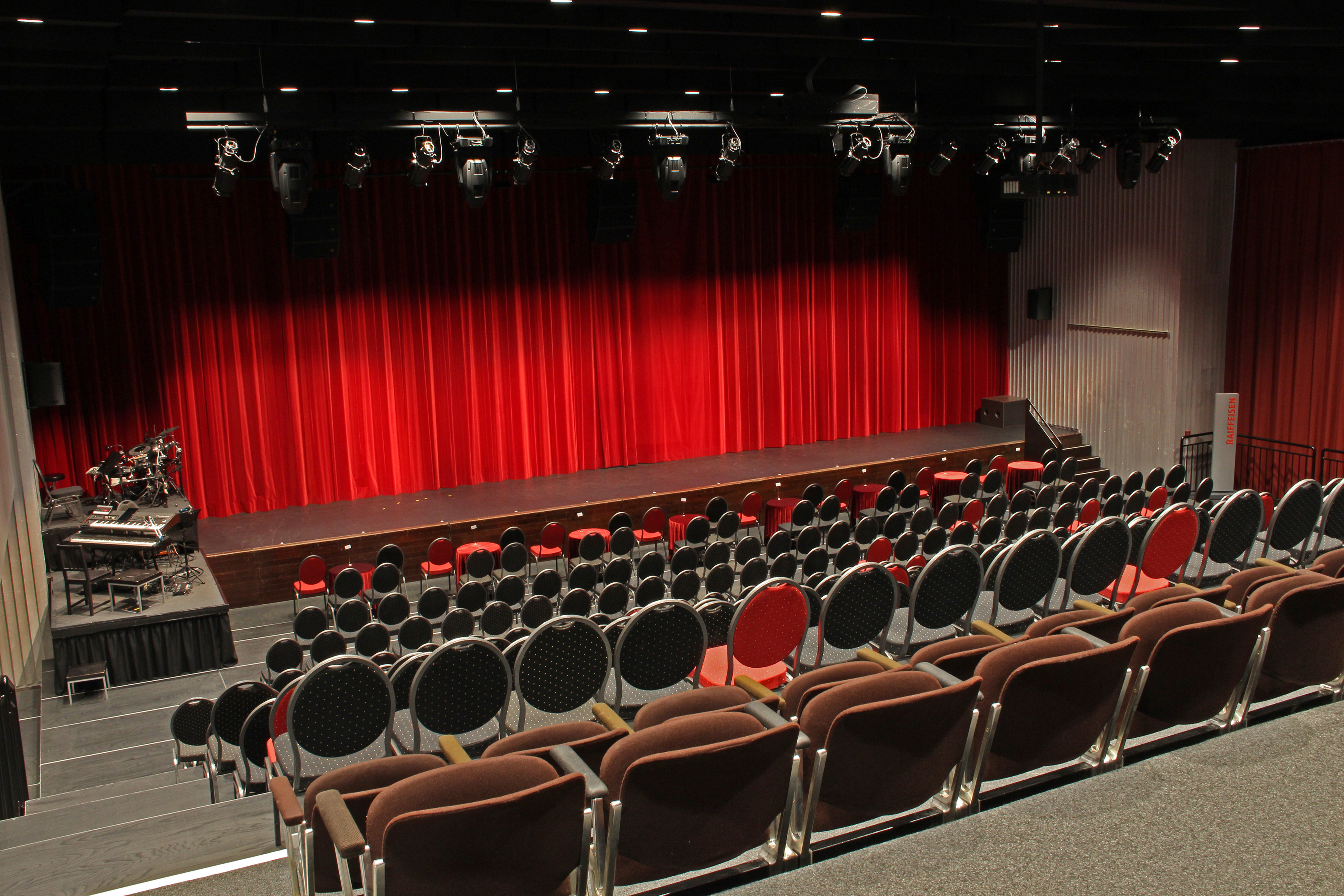 Der renovierte Theatersaal von Le Théâtre.